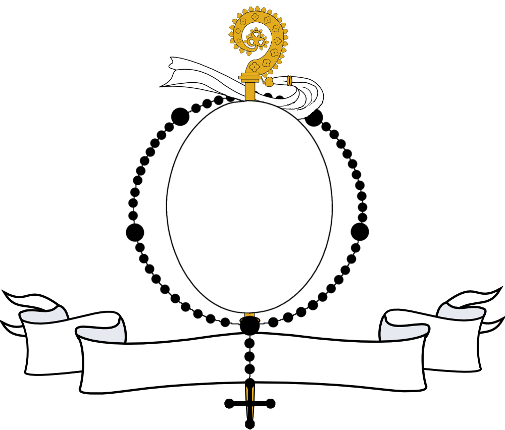 Timbre de l'écu d'abbesse